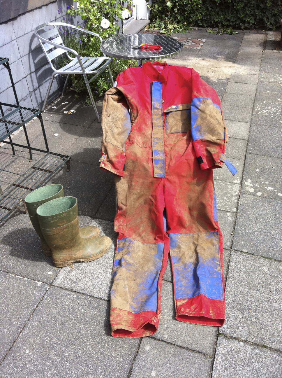 Schlatz nach einer kurzen Höhlenbefahrung.